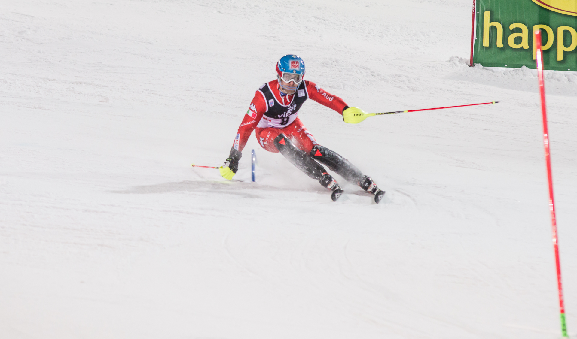 GROSS Stefano